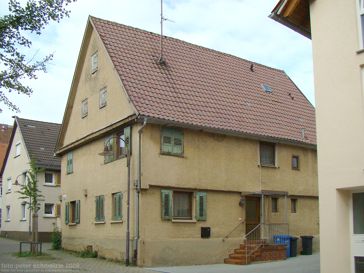 Denkmalgeschützte Gebäude Mittelstr. 21 in Heilbronn-Neckargartach